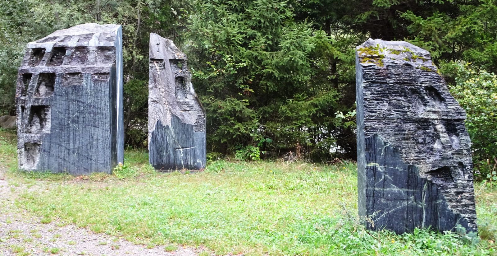 Plastik in Kienburg an der Isel